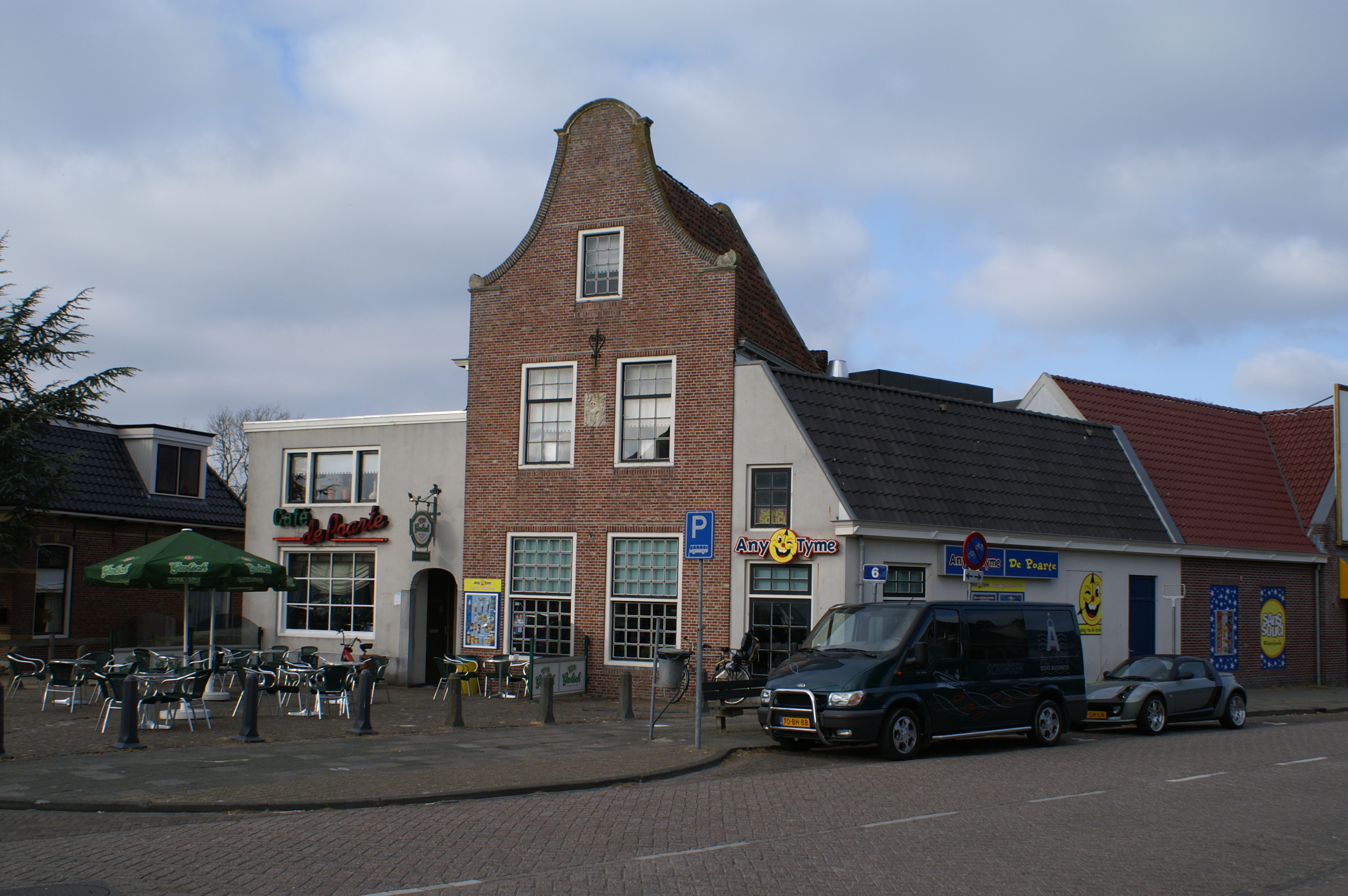 Poortgebouw van de verdwenen Hemmema-State te Berlikum.